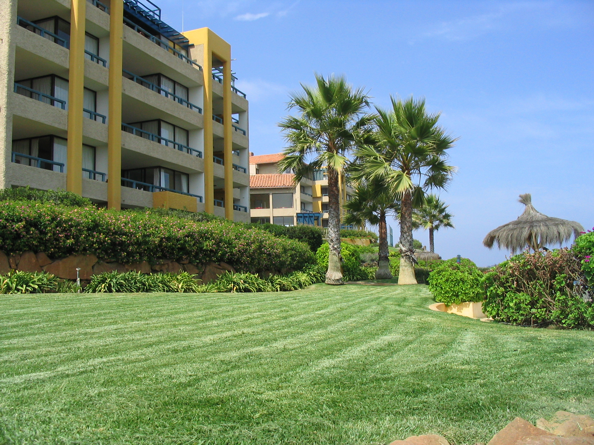 Conjuntos turísticos en Playa Blanca, Tongoy, Chile.